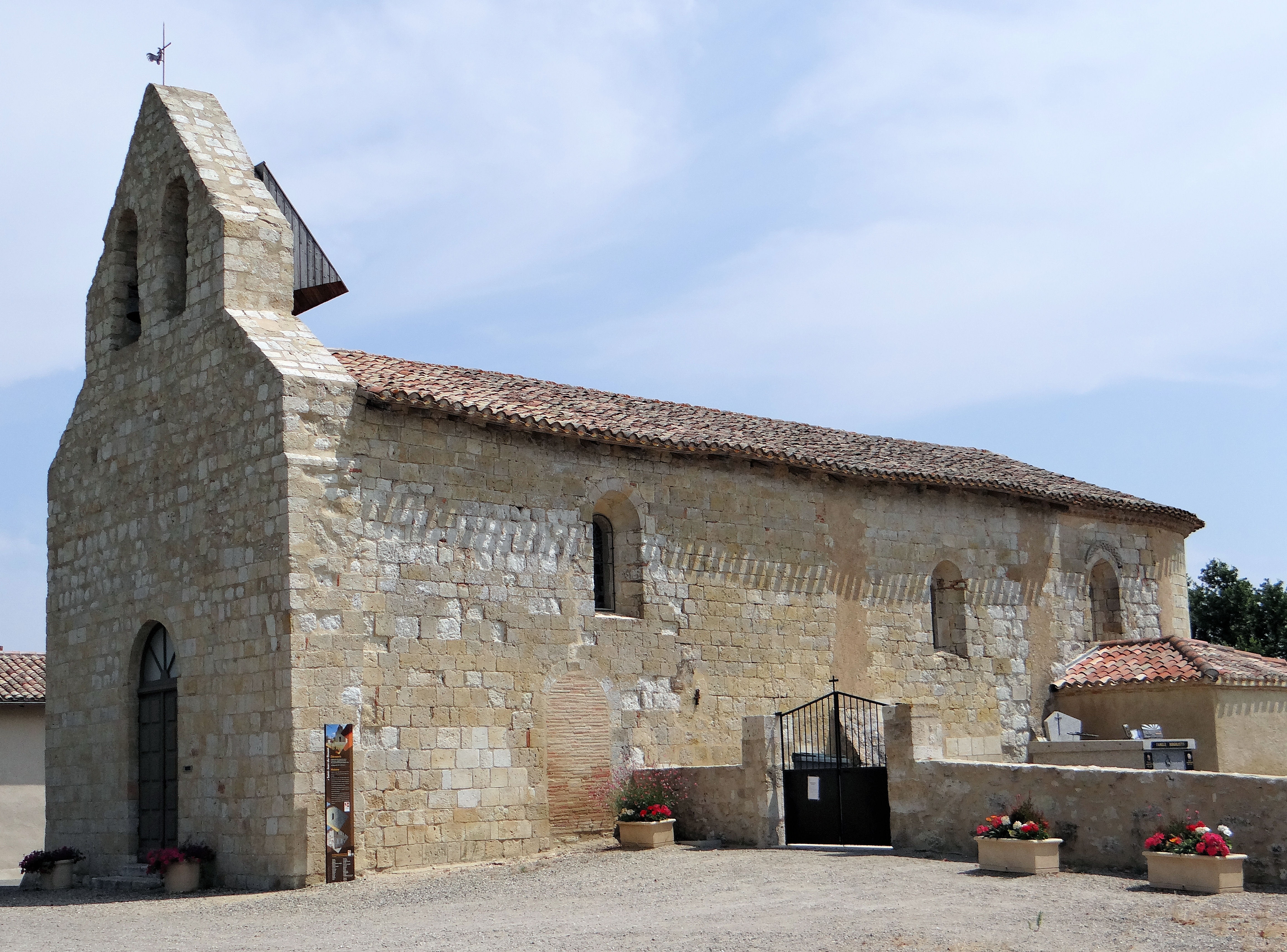 Saint-Jean-du-Bouzet - Église Saint-Jean - Ensemble